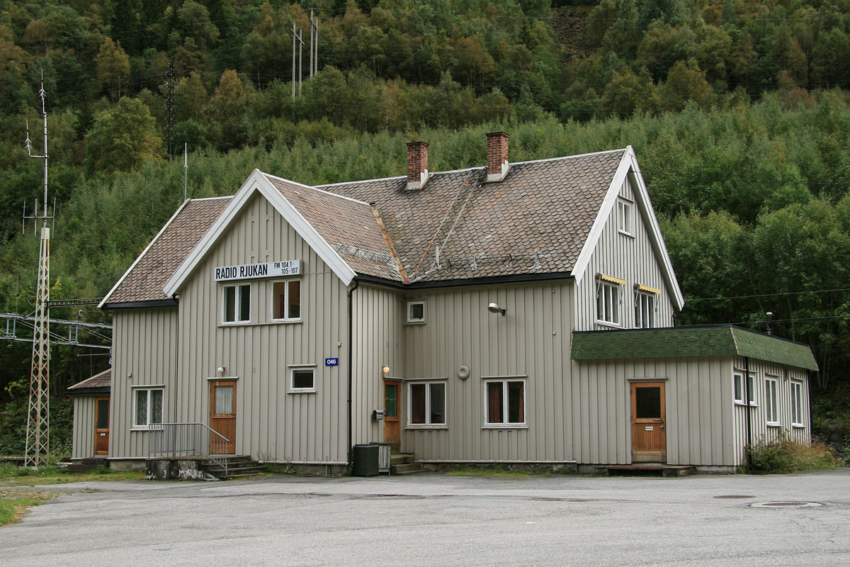 Rjukan stasjon i 2010, sett fra byen.